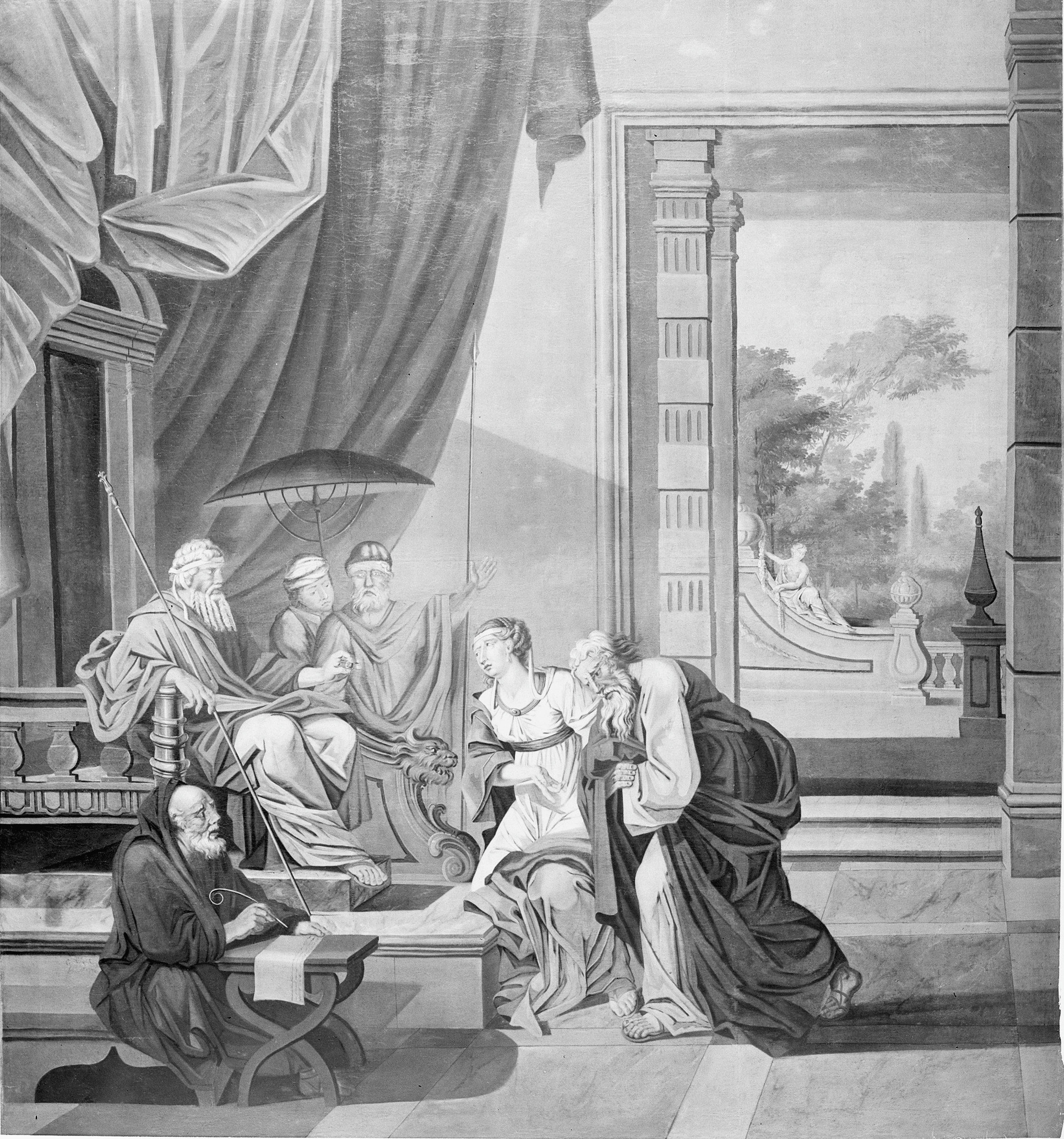 Raadhuis: wandschildering - Esther en Ahasverus